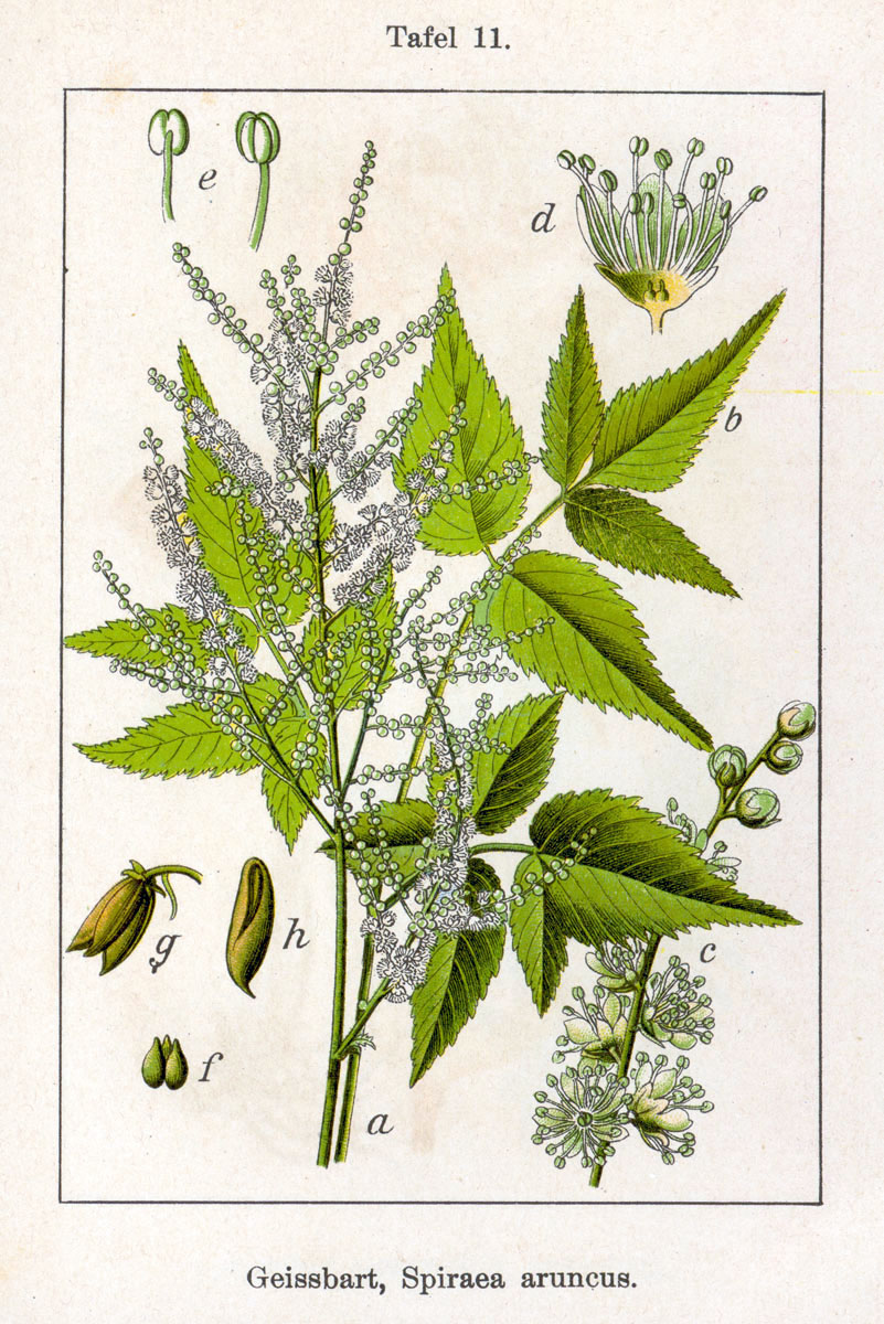 Aruncus sylvester Kostel. ex Maxim., syn. Aruncus dioicus (Walter) Fernald, Spiraea aruncus L. Original Description Geissbart, Spiraea aruncus